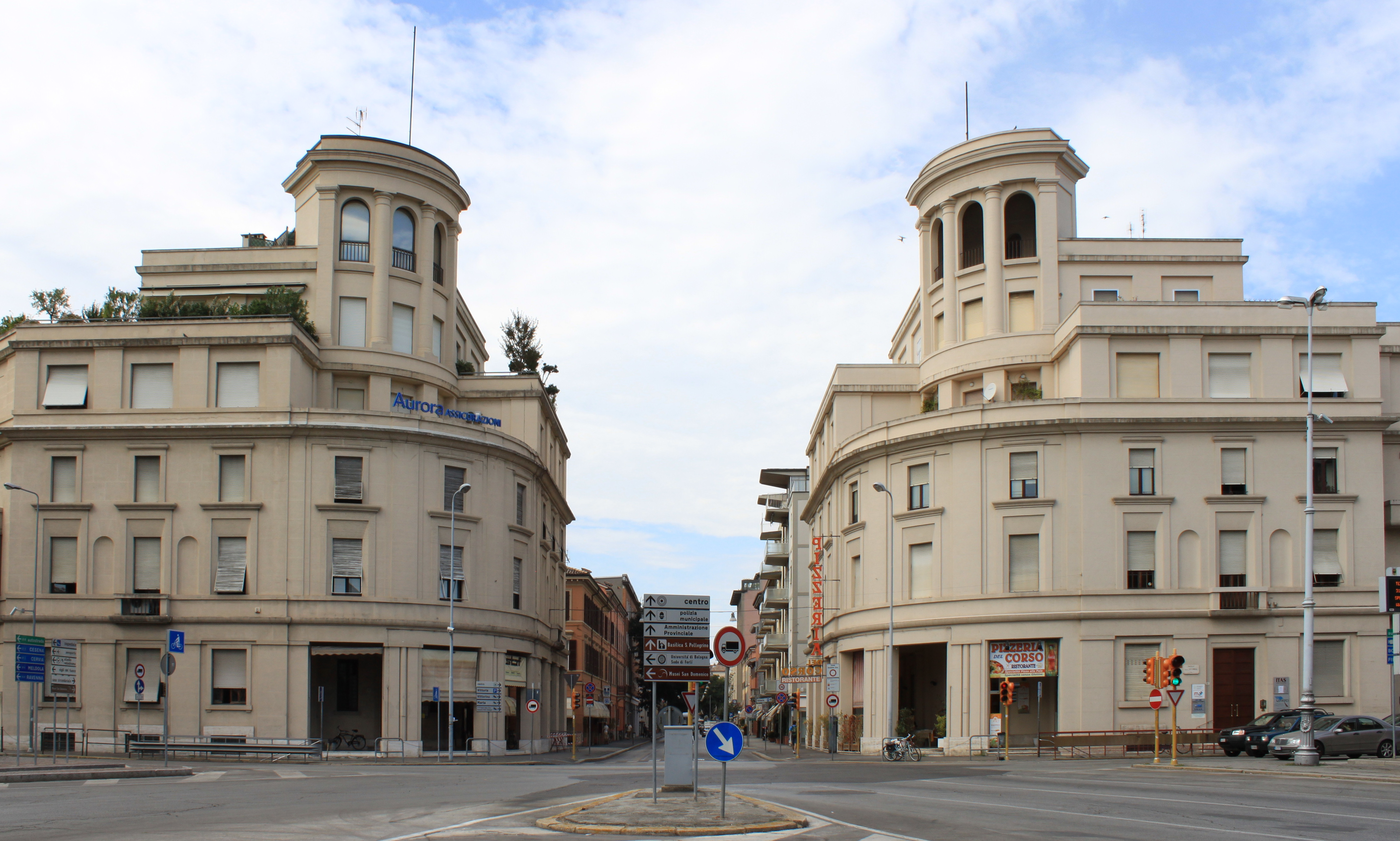 Palazzine Gemelle in Piazzale della Vittoria a Forlì (Italia) che delimitano l'ingresso del Corso della Repubblica